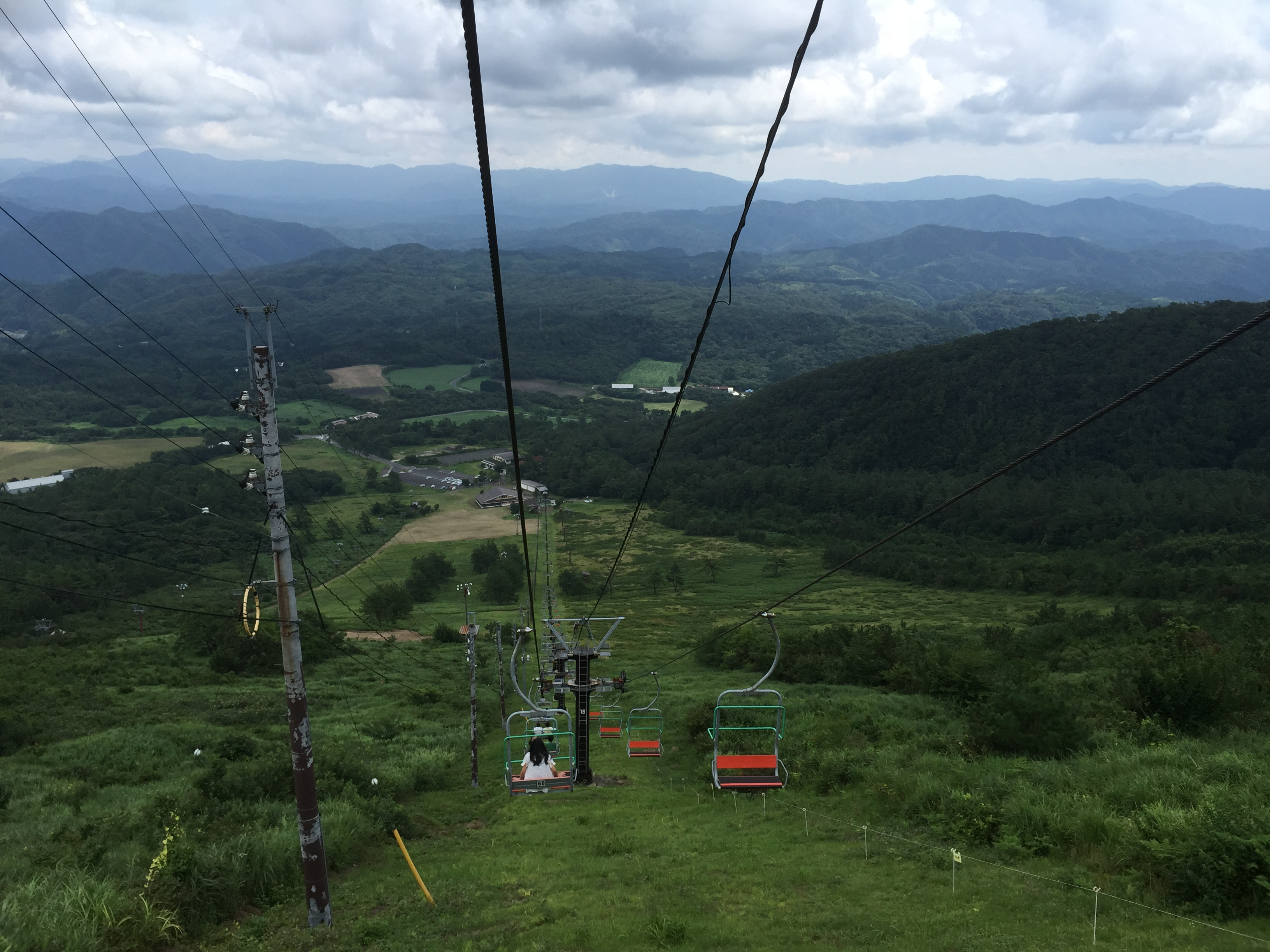 島根県三瓶山東の原の三瓶観光リフト